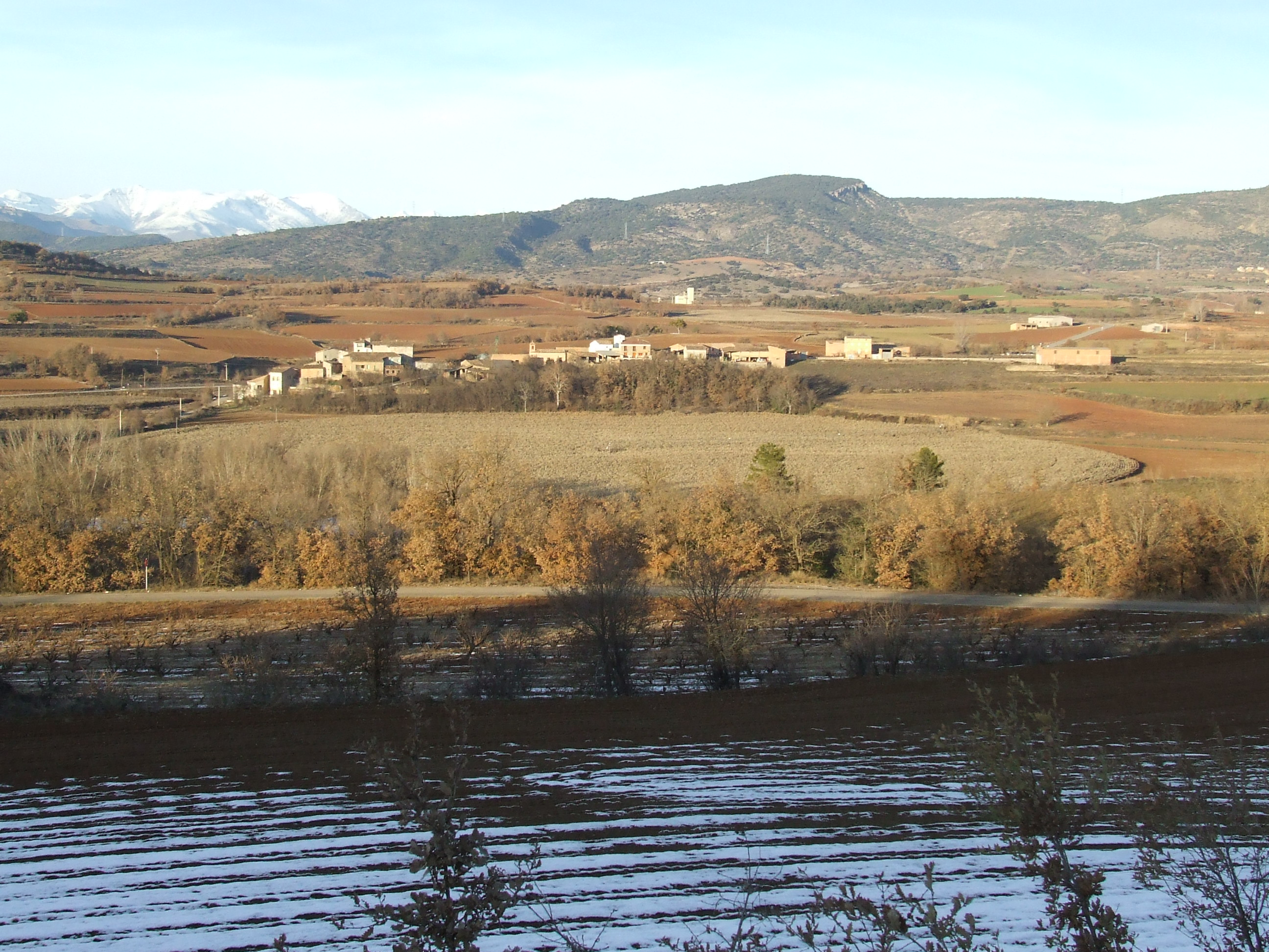 El poble de Fontsagrada (Sant Serni, Gavet de la Conca, Pallars Jussà)